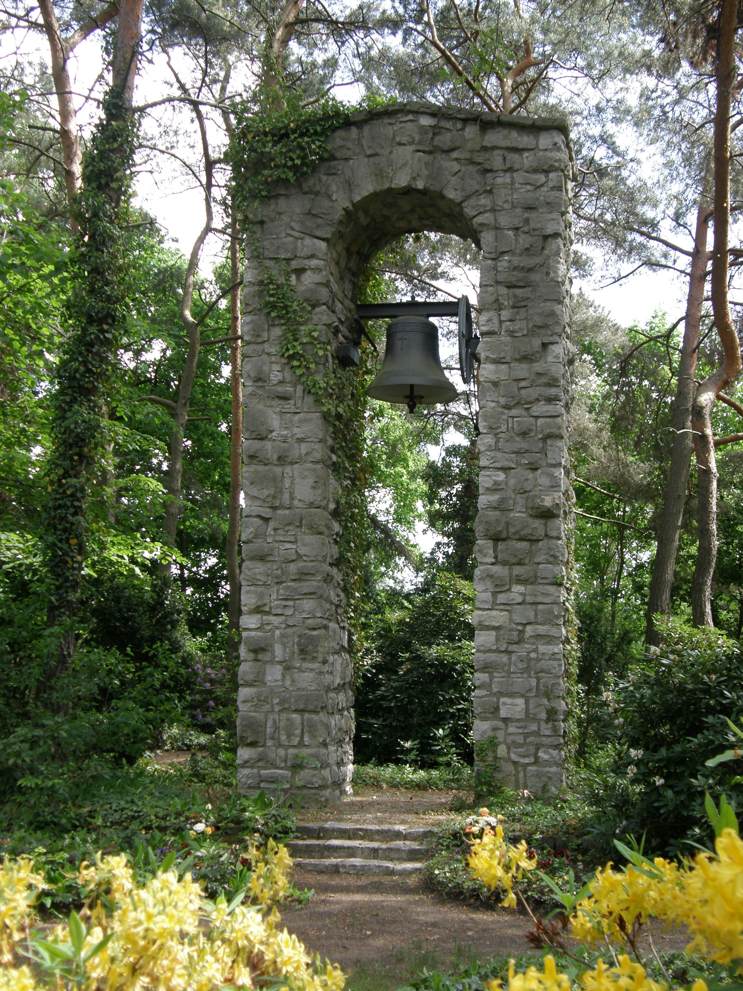 Berlin-Mahlsdorf; Rahnsdorfer Straße, Waldfriedhof, Campanile